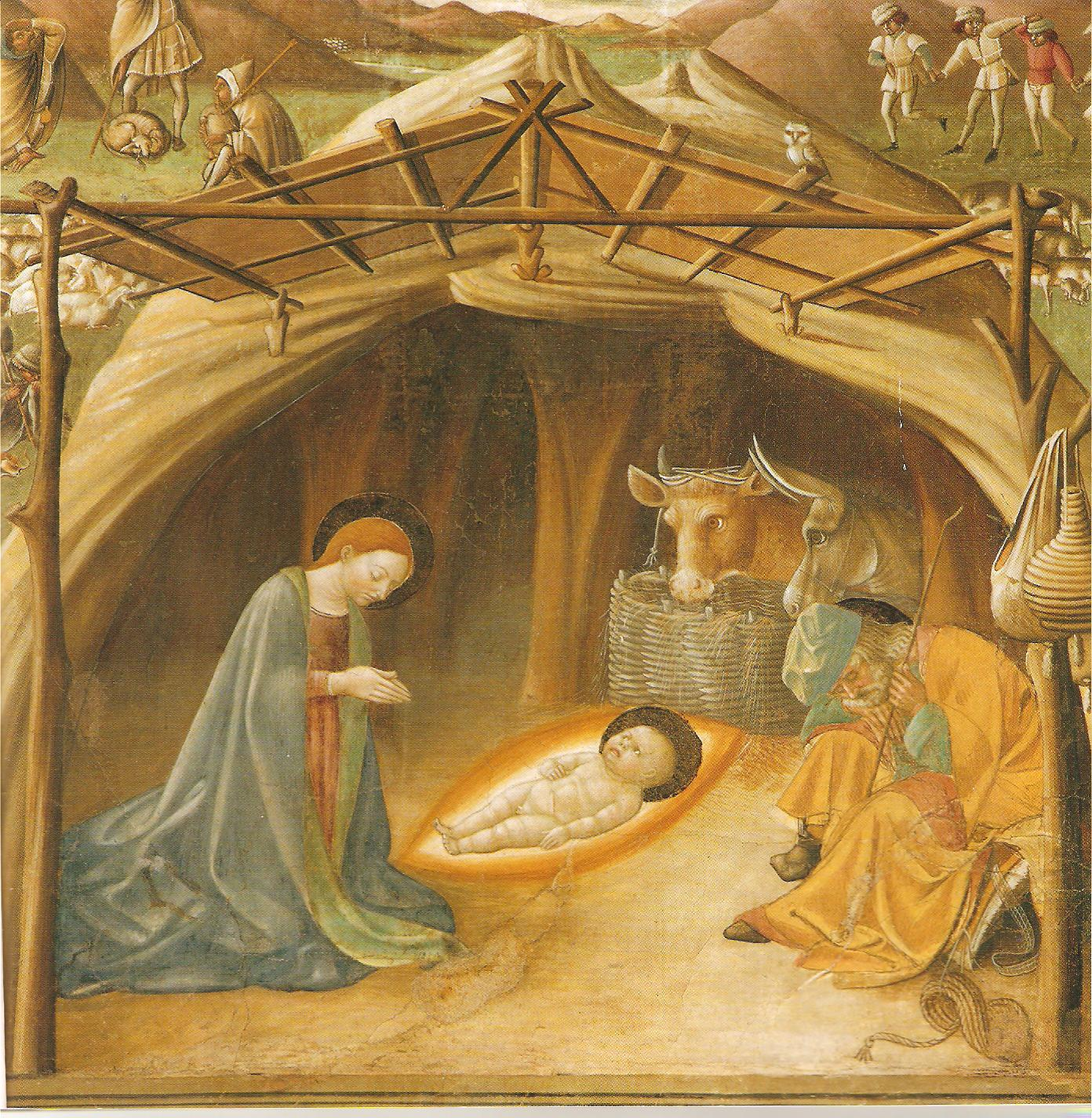 Particolare degli affreschi con la vita della Madonna nel presbiterio del Duomo di Atri (1460-1470).